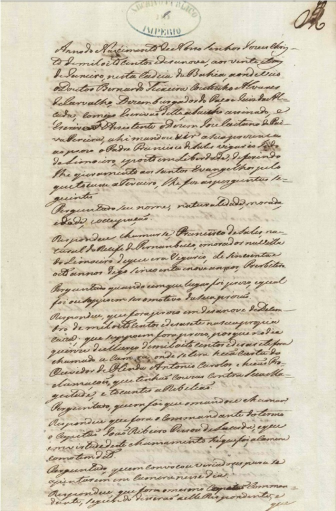 Página do processo original dos réus da rebelião de Pernambuco contendo Auto de perguntas ao padre Francisco de Sales sobre sua atuação na Revolução Pernambucana, ocorrida em 1817. Fundo: Diversos Códices.